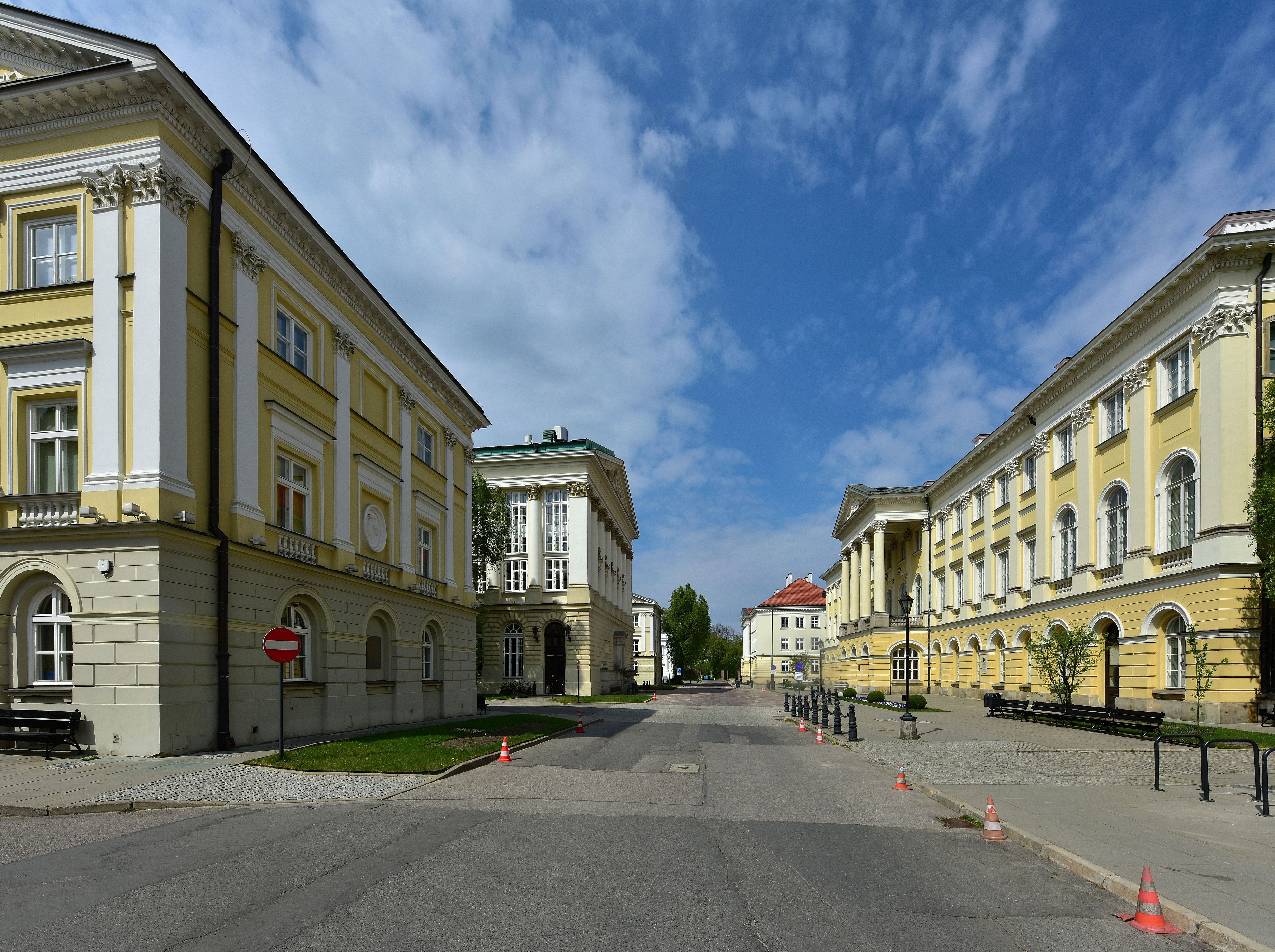 Kampus UW i Pałac Kazimierzowski w Warszawie